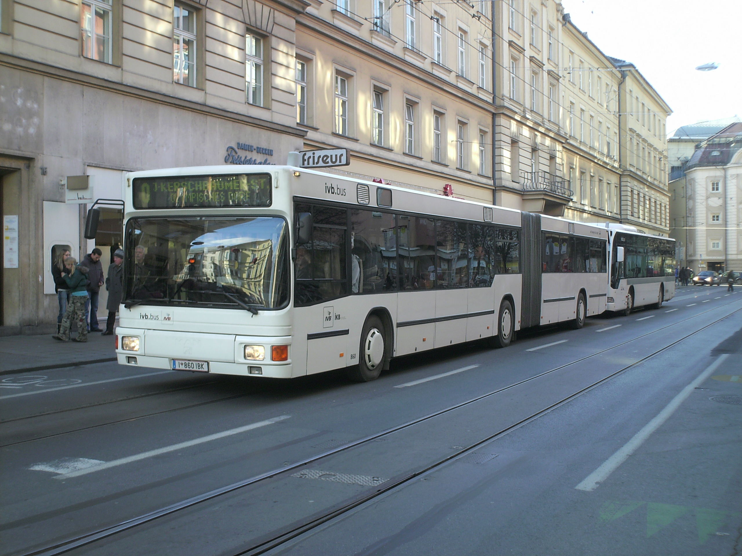 Wagen 860 der Innsbrucker Verkehrsbetriebe an der Haltestelle "Maria-Theresien-Straße" auf der Linie "O"